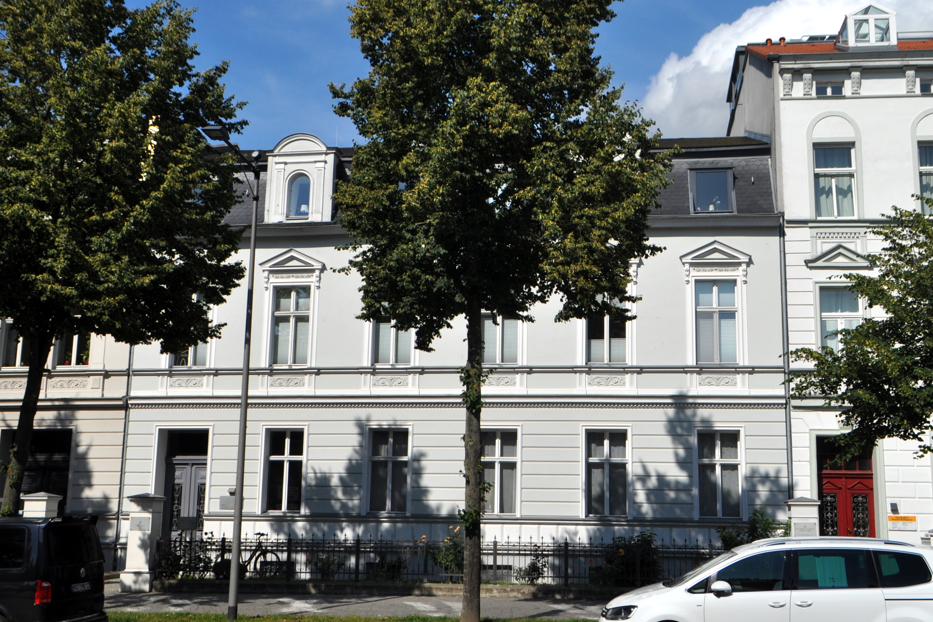 Stralsund, Olof-Palme-Platz 2, (2017-07-06) This is a photograph of an architectural monument.